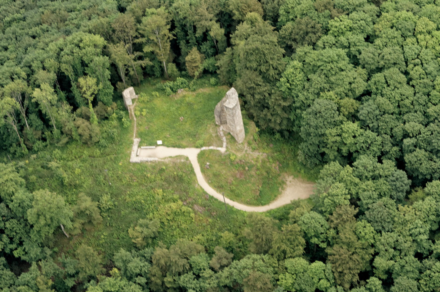 Fotoflug Sauerland Nord. Attendorn, Ruine Waldenburg The making of this document was supported by the Community-Budget of Wikimedia Germany.